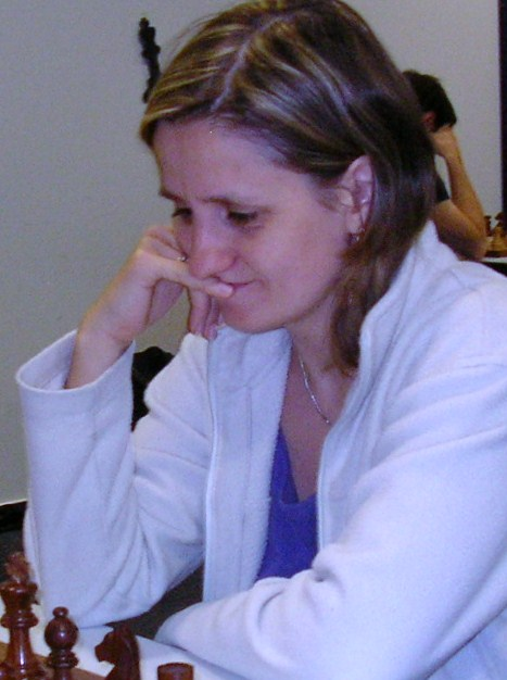 Anna Zozulia, 8. LGA Premium Schach Cup 2011 in Nürnberg.